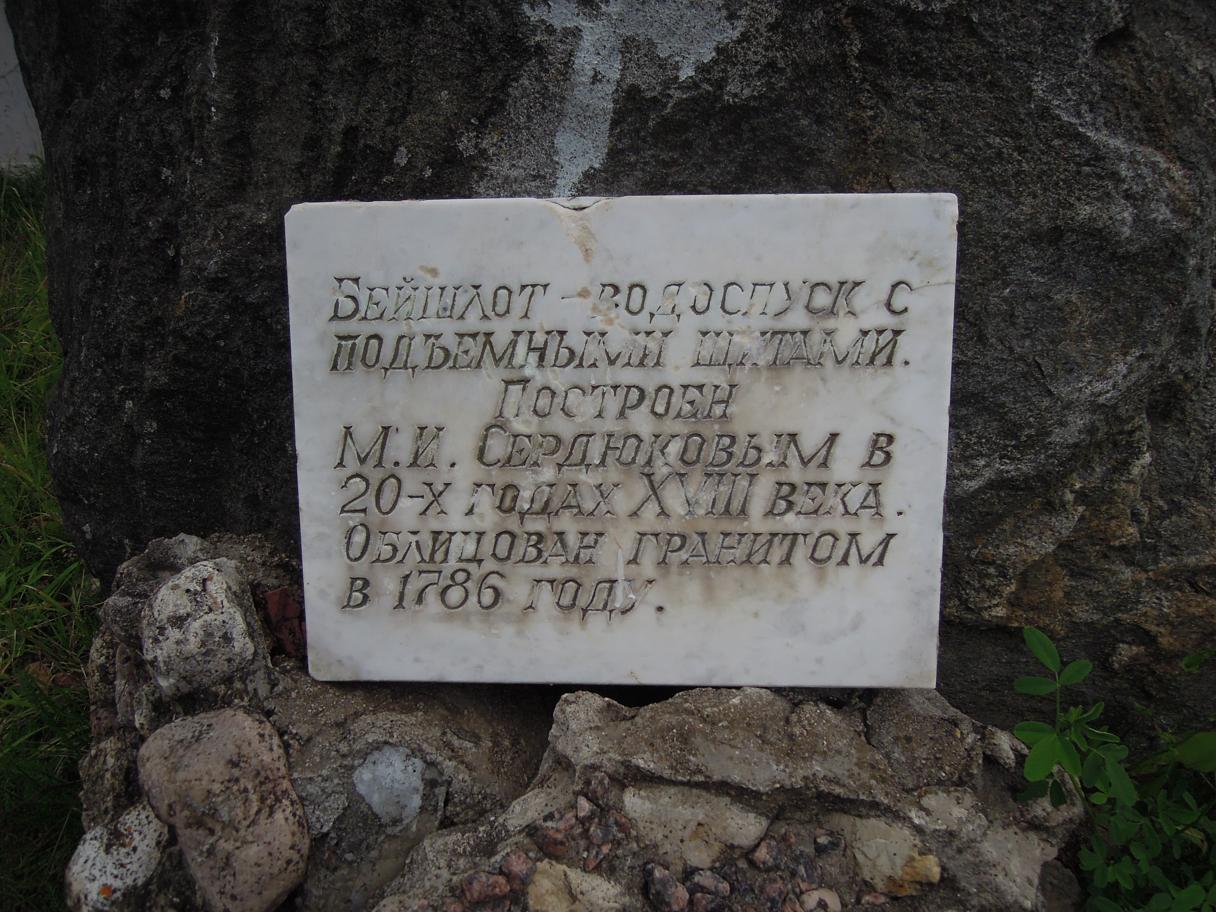 Плотина заводская: Вышний Волочёк, Тверская область